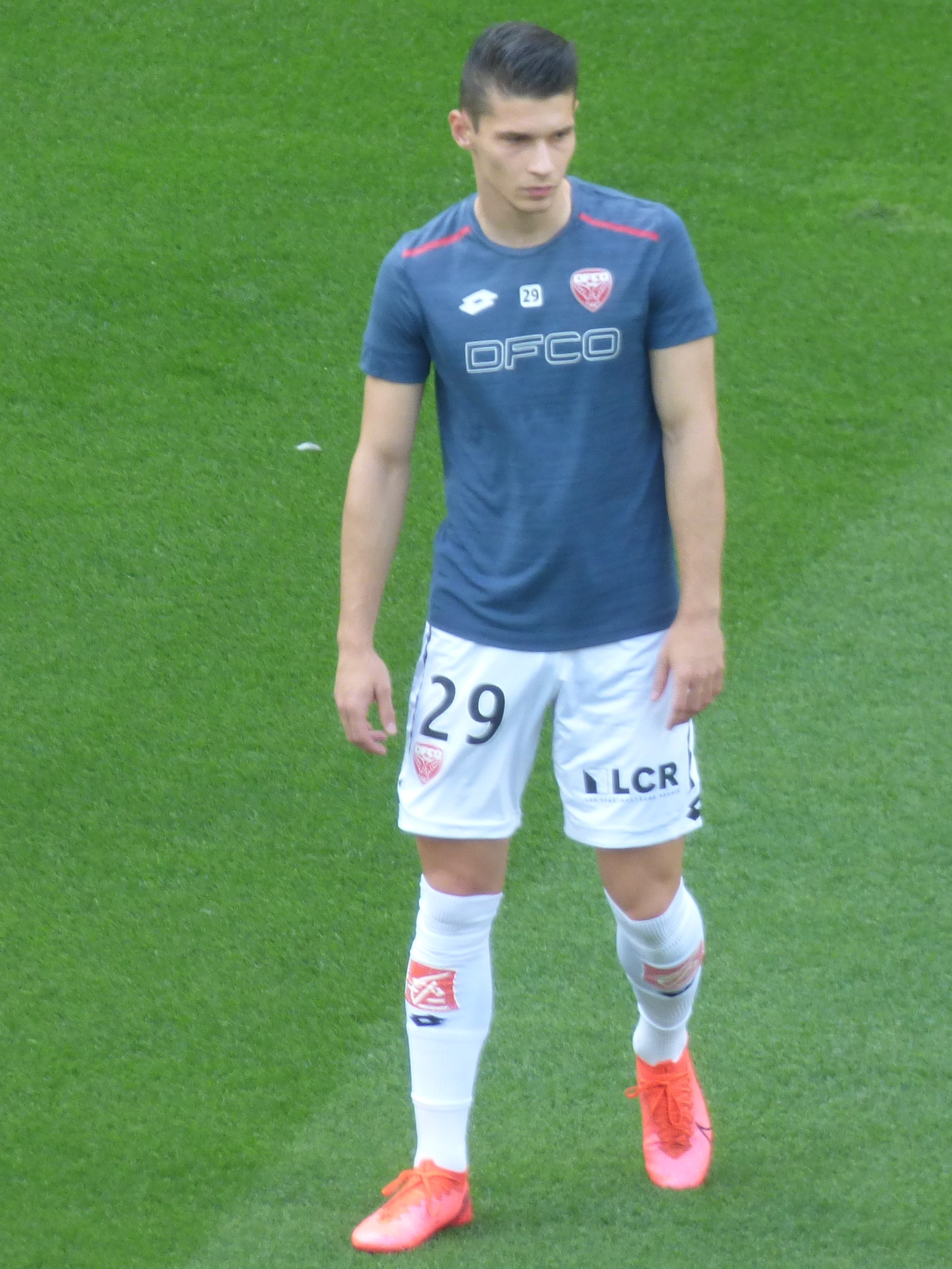 Alex Dobre lors du match amical RC Lens / Dijon FCO, le 15 août 2020, au Stade Bollaert-Delelis de Lens.